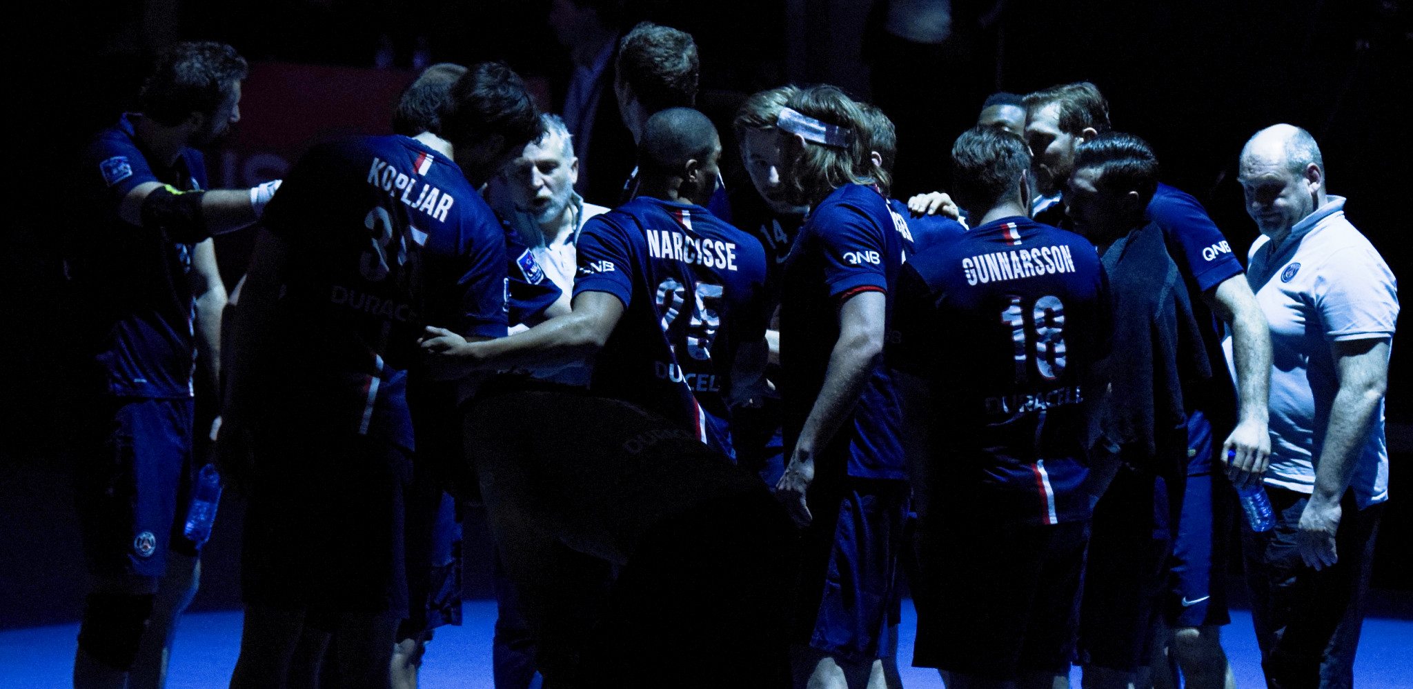 Rencontre de la 20e journée de LNh entre le PSG Handball et Sélestat. A Coubertin, le 08 avril 2015.